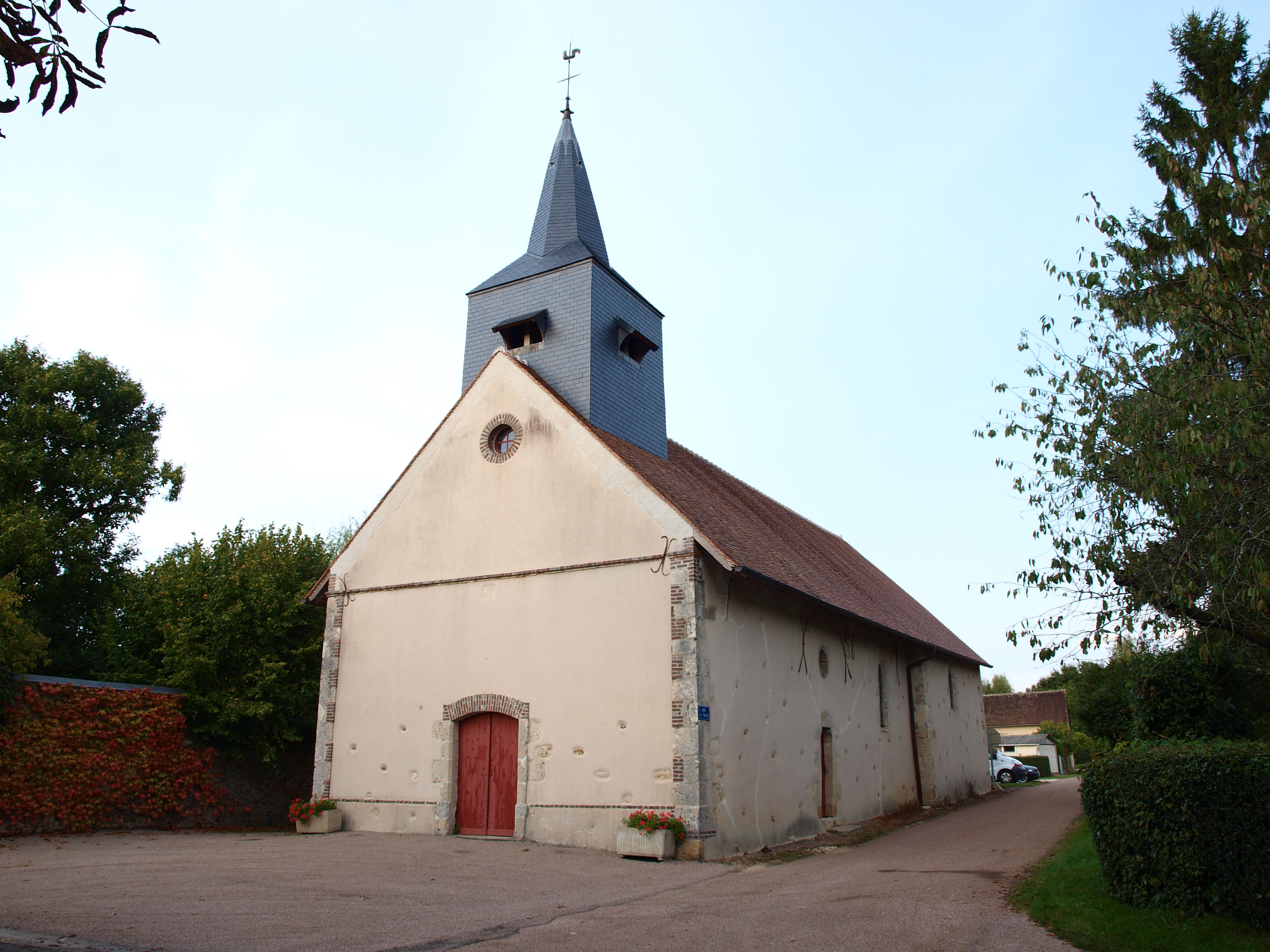 Chêne-Arnoult (Yonne, France) ; église